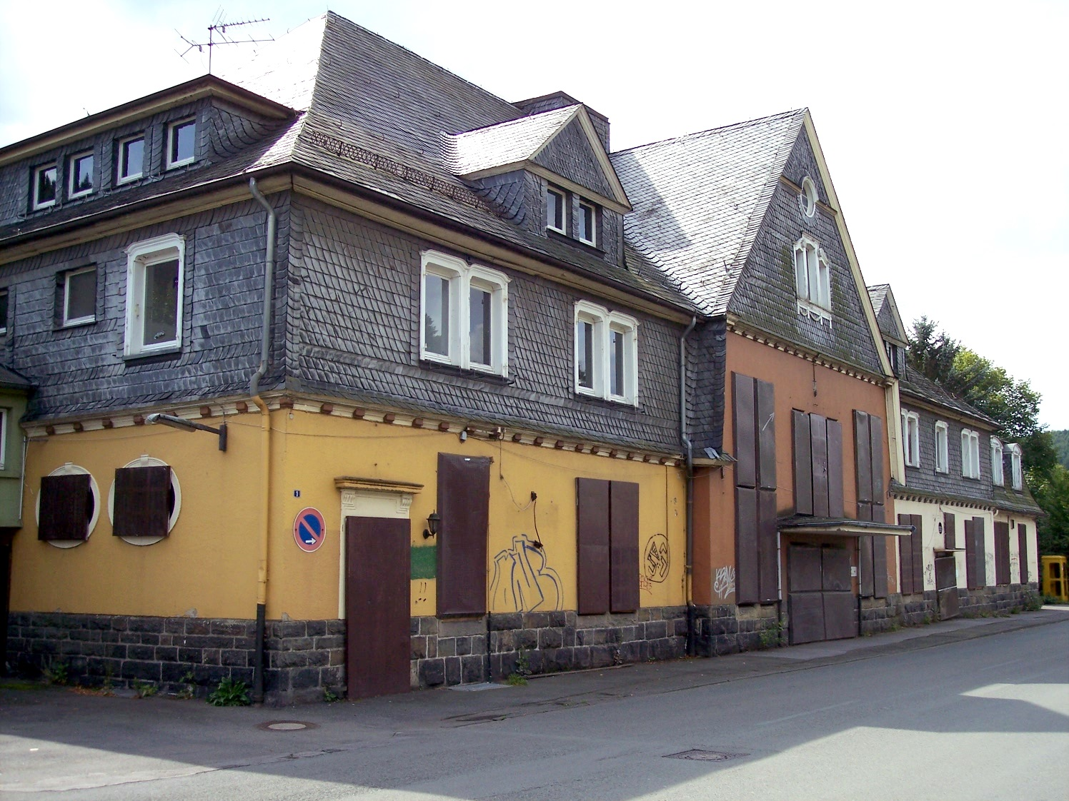 Bahnhof Brügge (Leerstand)